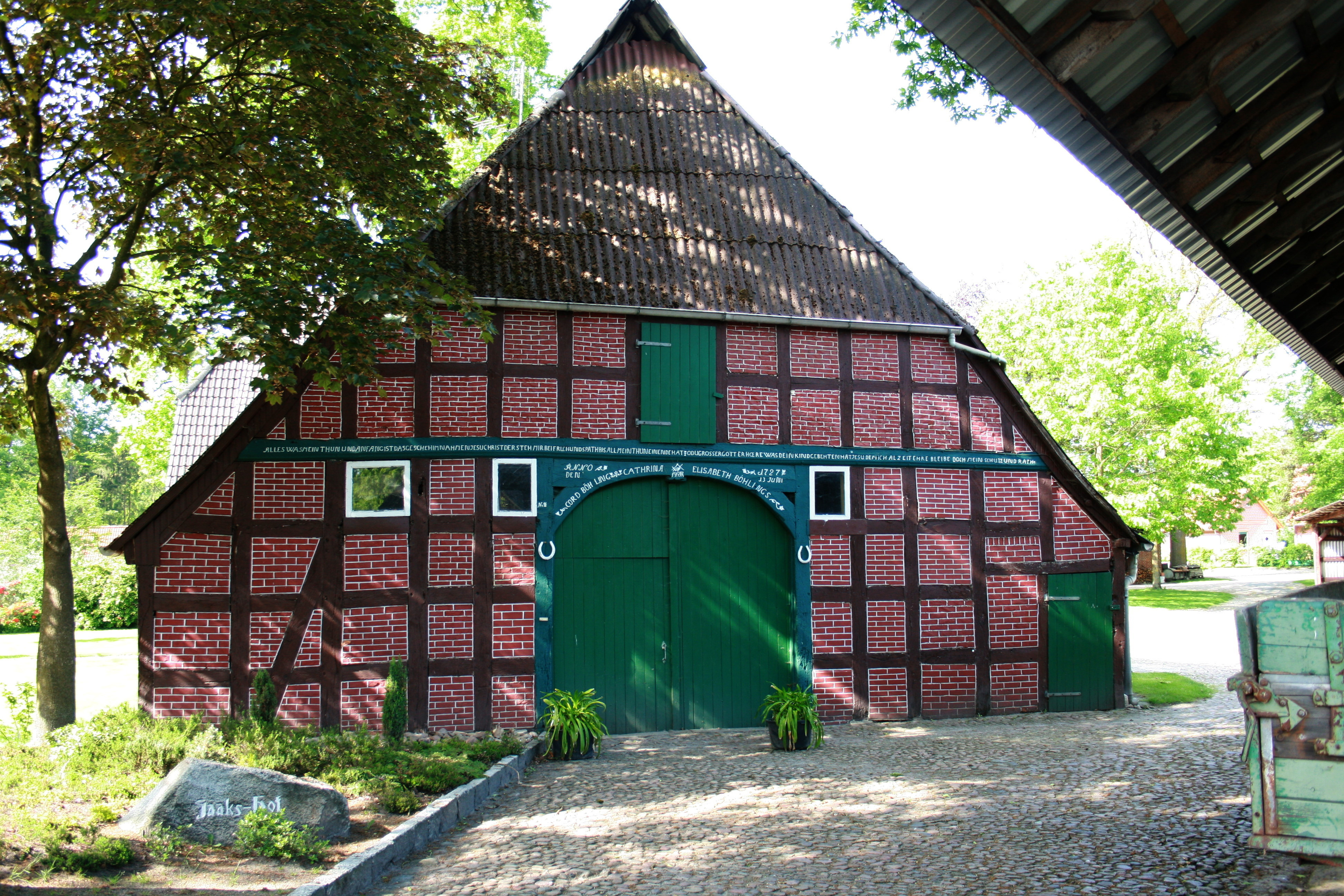 Grauen, Ortsteil vom Neuenkirchen (Lüneburger Heide)